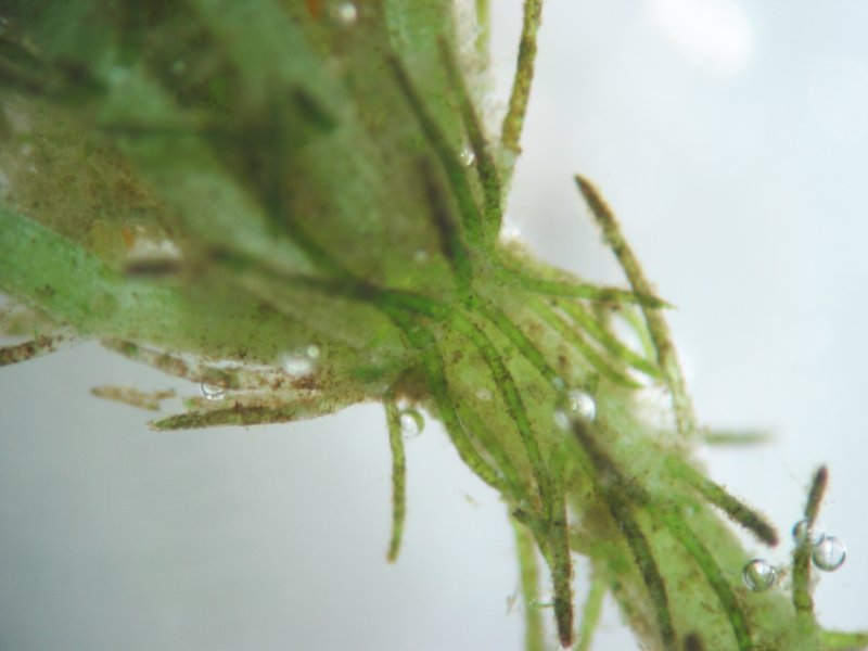 Vielstachelige Armleuchteralge Chara polyacantha, Habitus, Müritz-Gebiet